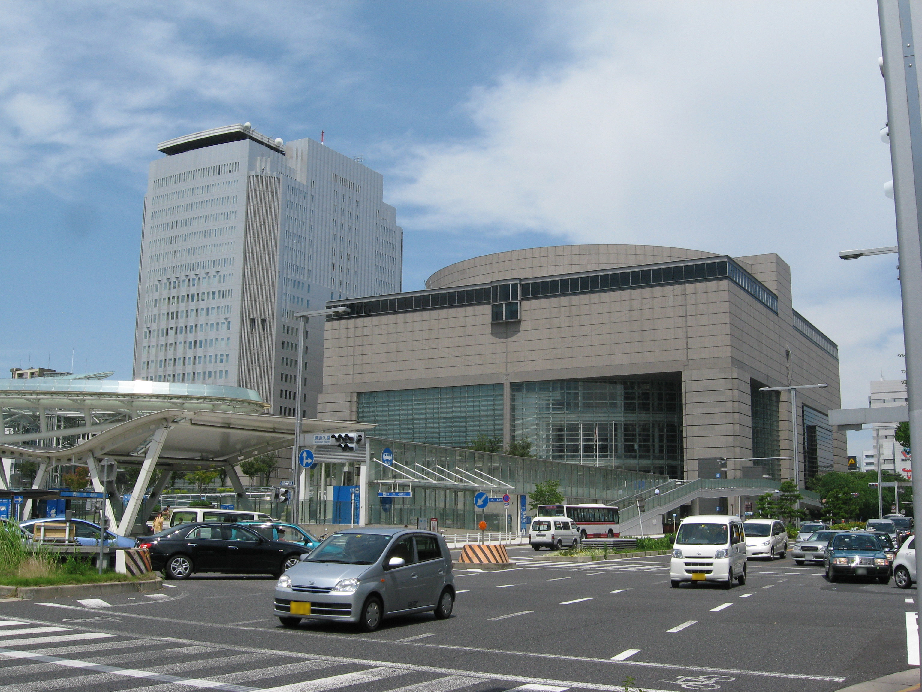 愛知芸術文化センター (Aichi Arts Center)